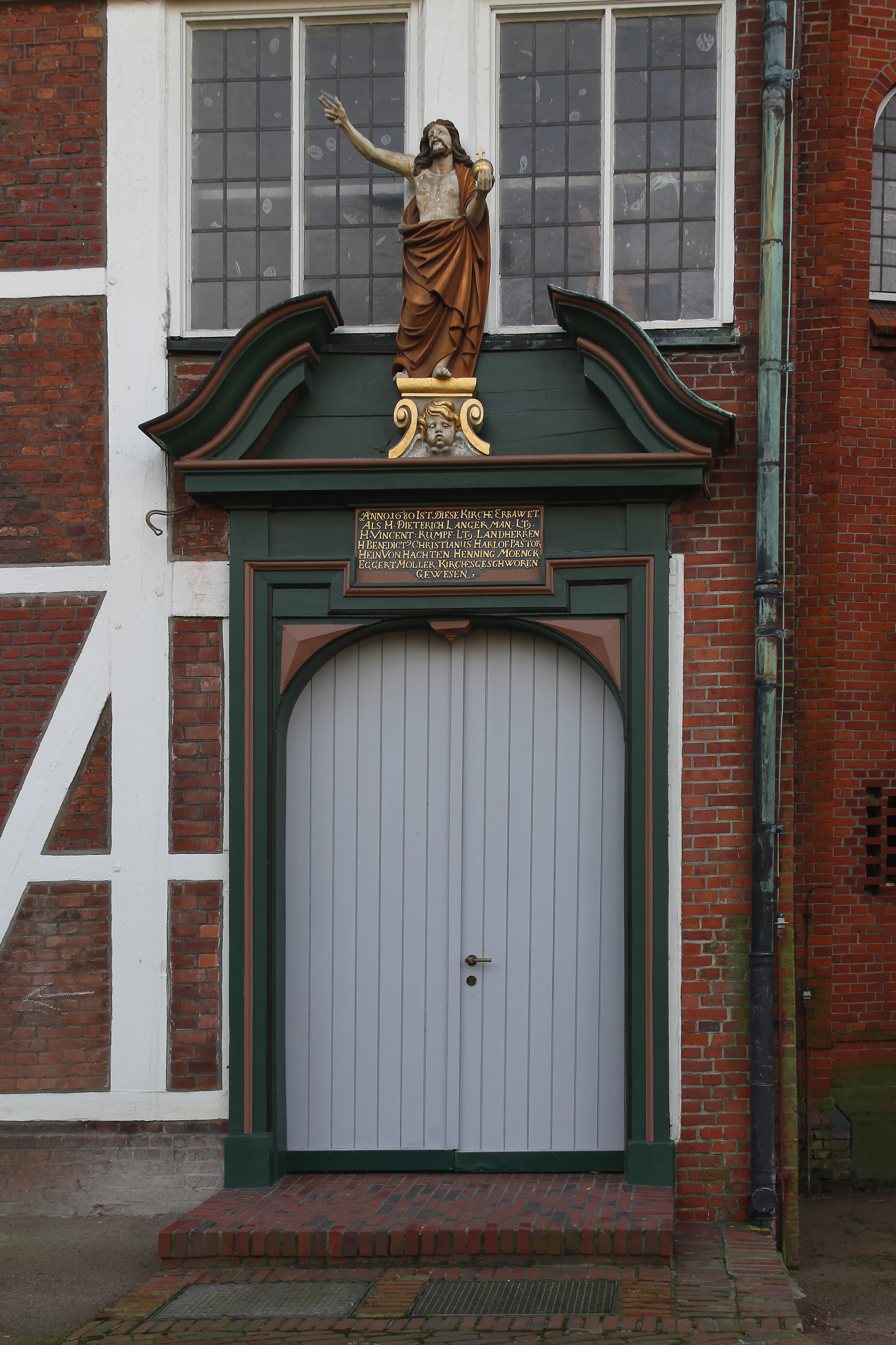 Hamburg-Moorfleet, St. Nikolai, Haupttür